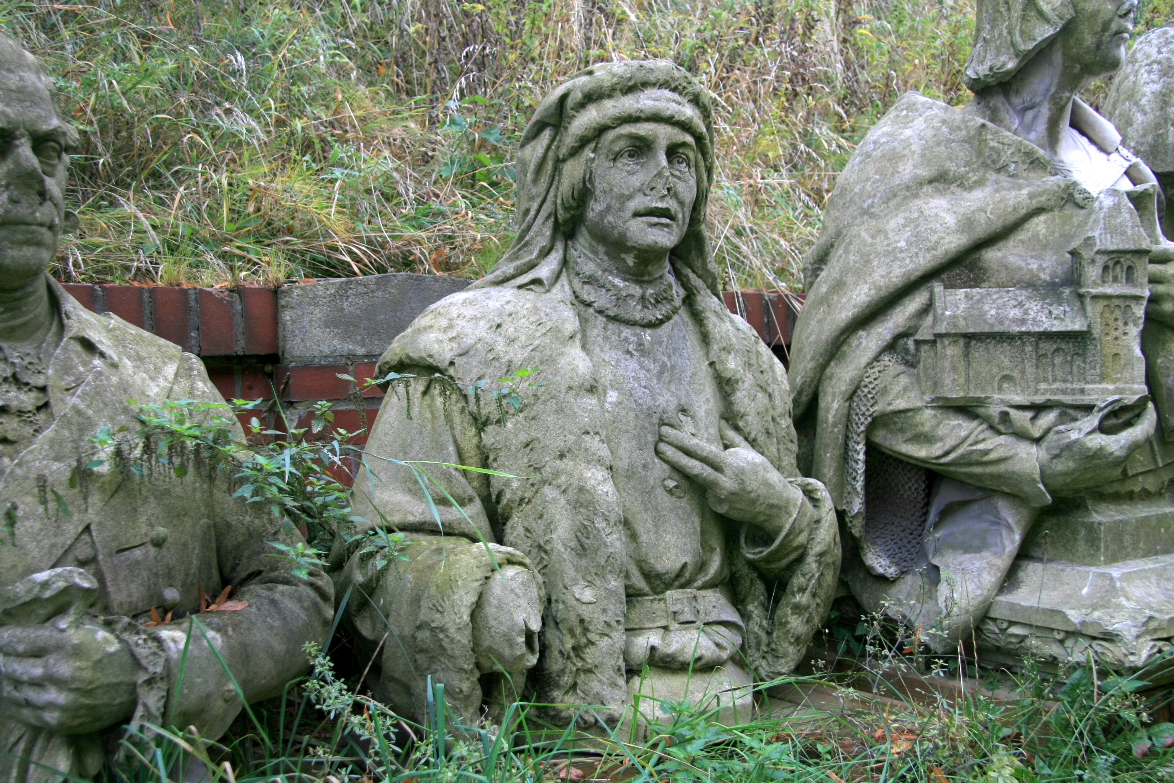 2009 buste du maire de Berlin Wilke von Blankenfeld décédé en 1474. Ce buste se trouvait dans la Citadelle de Spandau